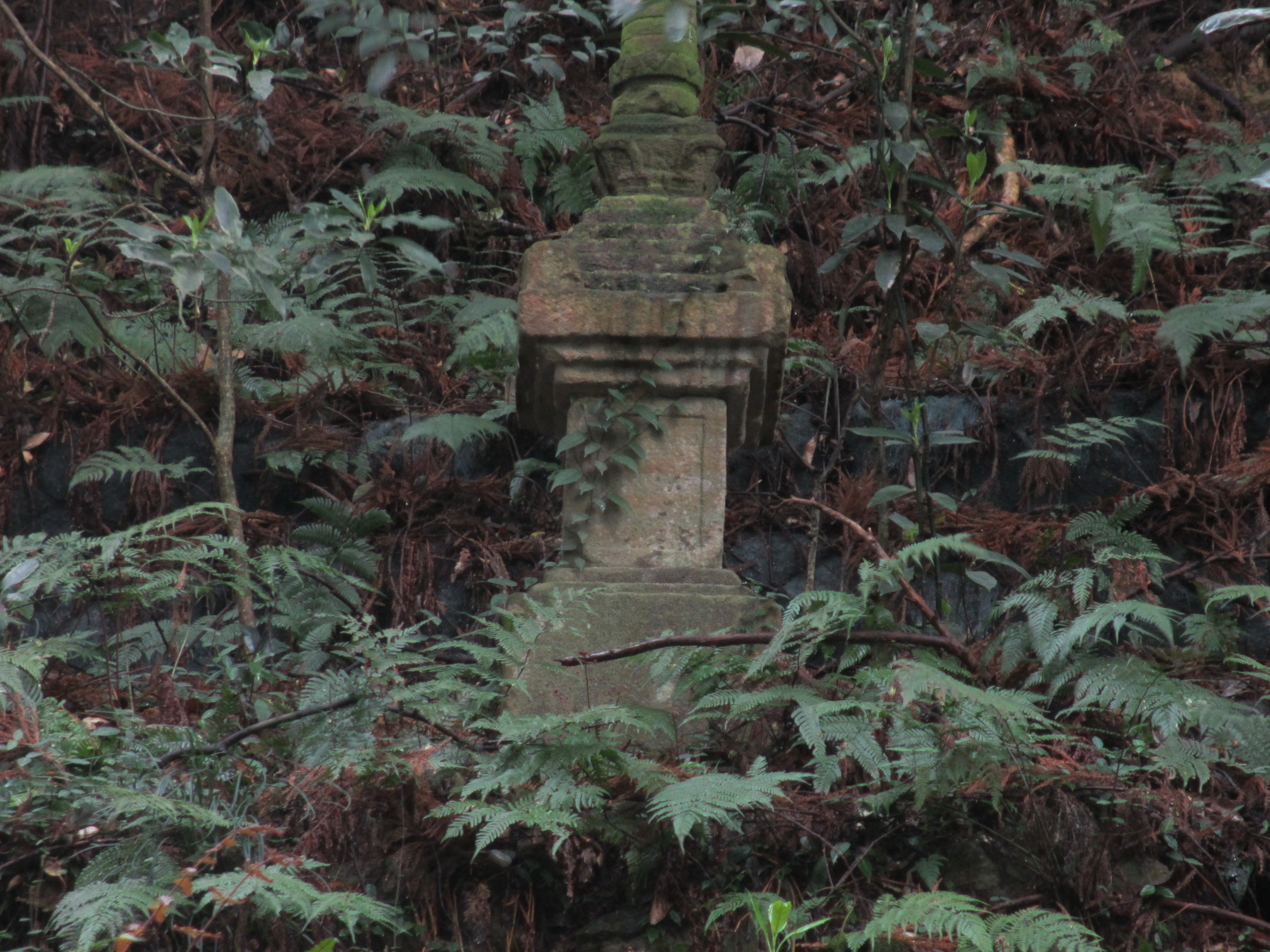 現在は登る事の出来ない石段最上段、撮影はズームUP